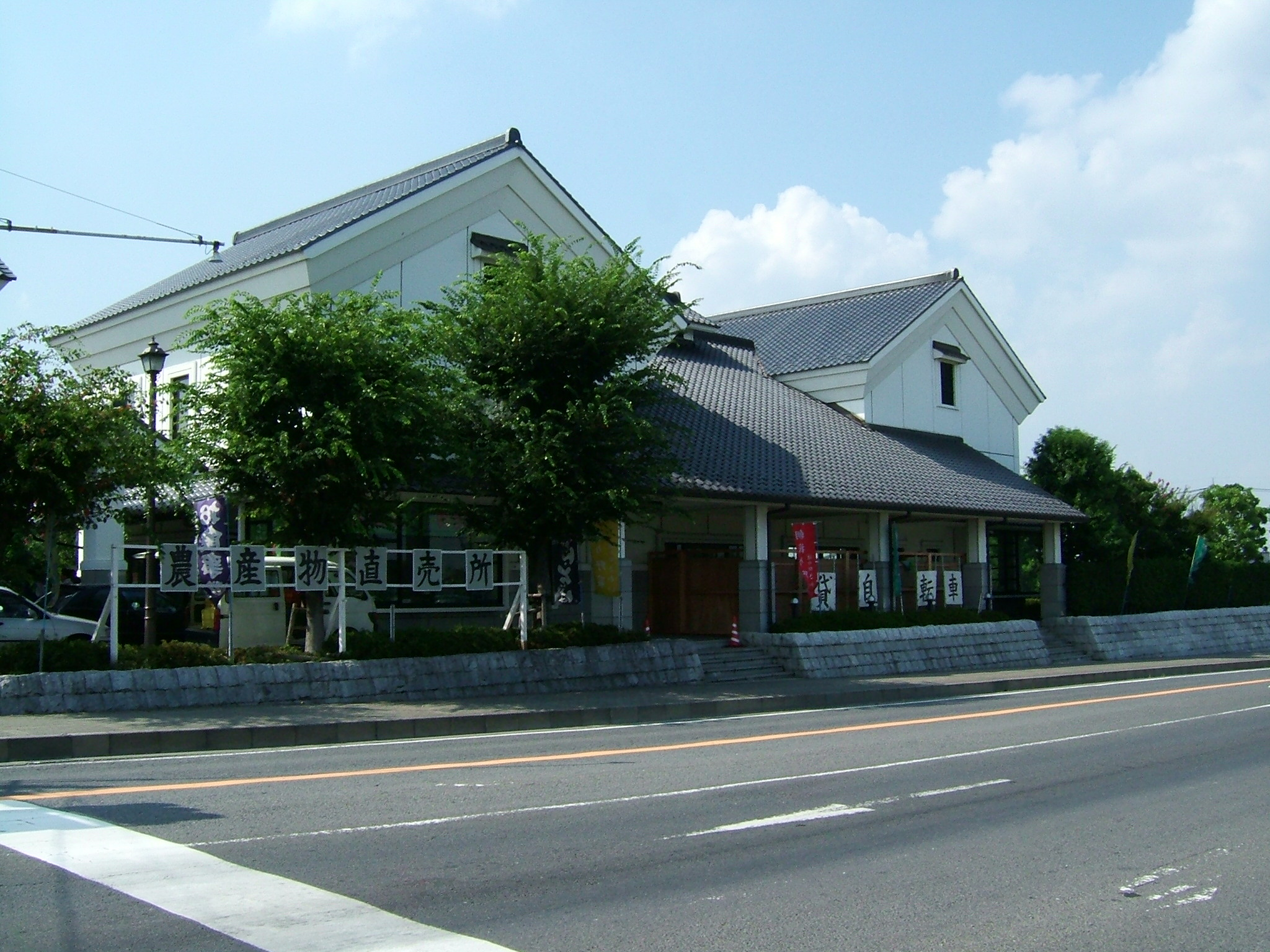 道の駅さかいの観光物産館